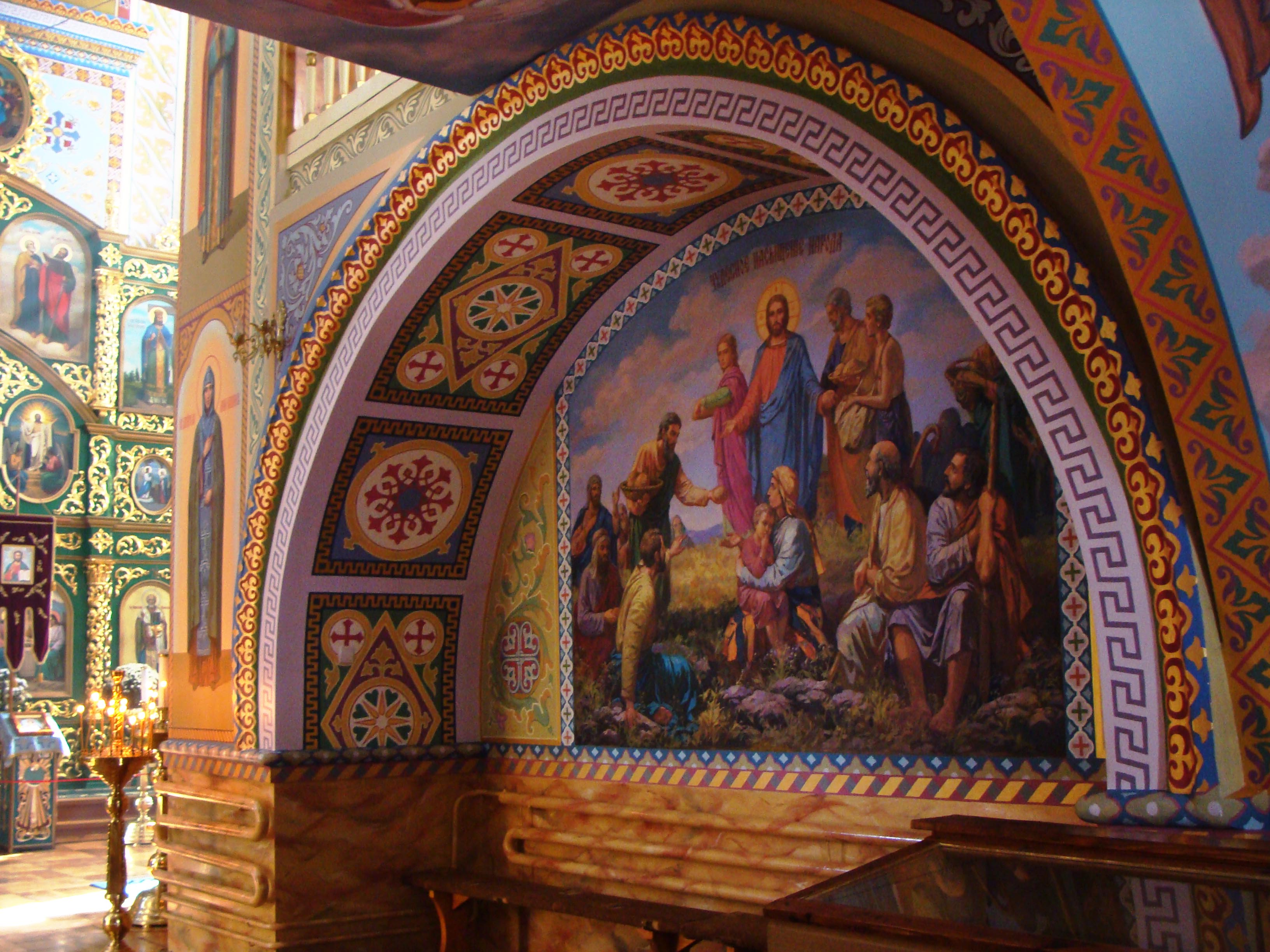 Чернігівська область, Прилуцький район, село Густиня